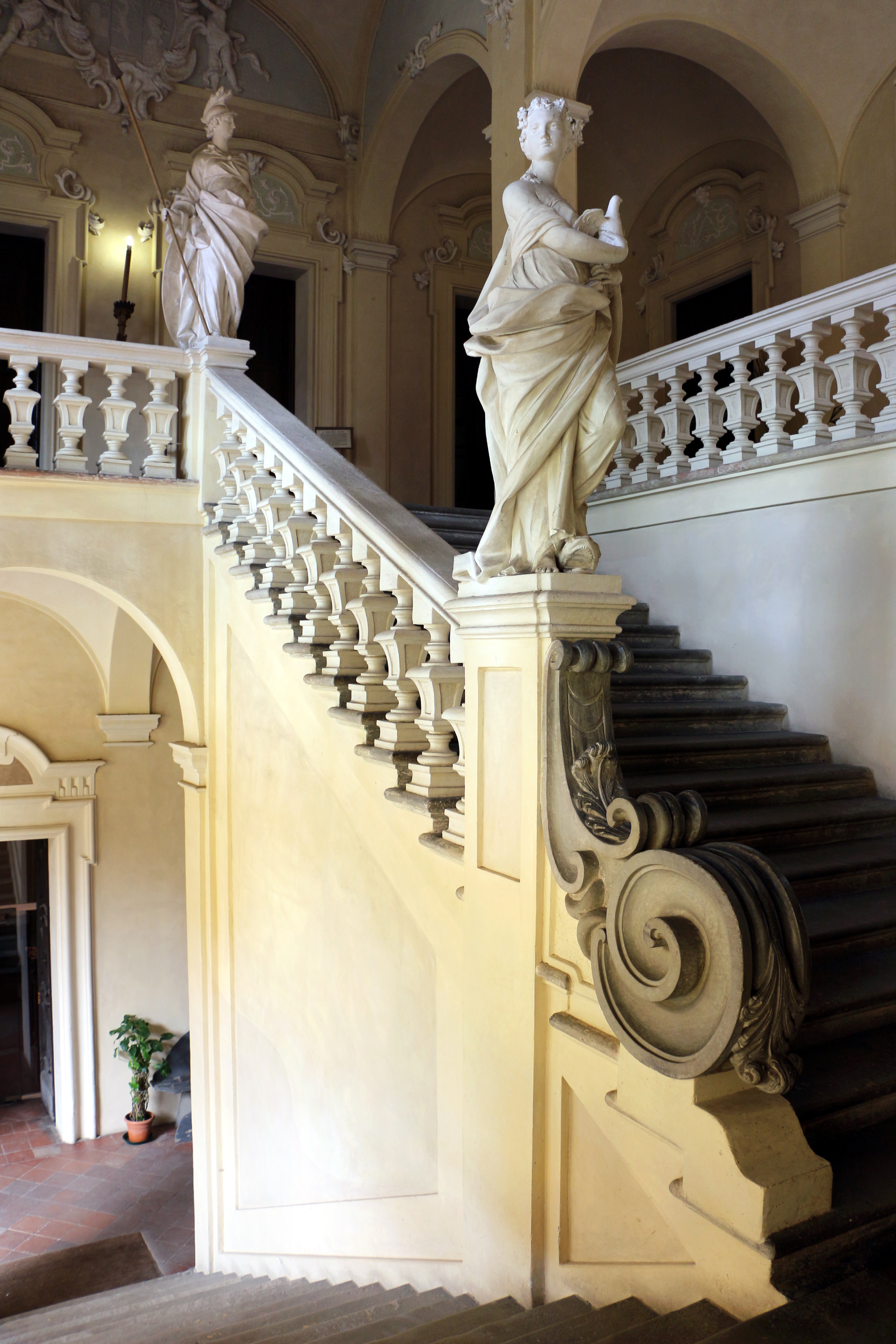 Palazzo Tozzoni This is a photo of a monument which is part of cultural heritage of Italy.